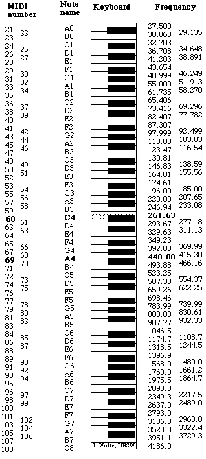 van pl: wiki Jonasz (11333 bajt├│w) Op Poolse Wikipedia GFDL